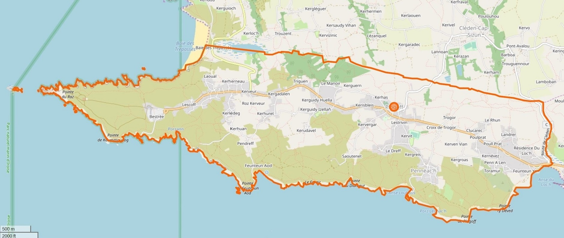 Cette carte a été créée à partir des données du projet Openstreetmap. This map may be incomplete, and may contain errors. Don't rely solely on it for navigation.